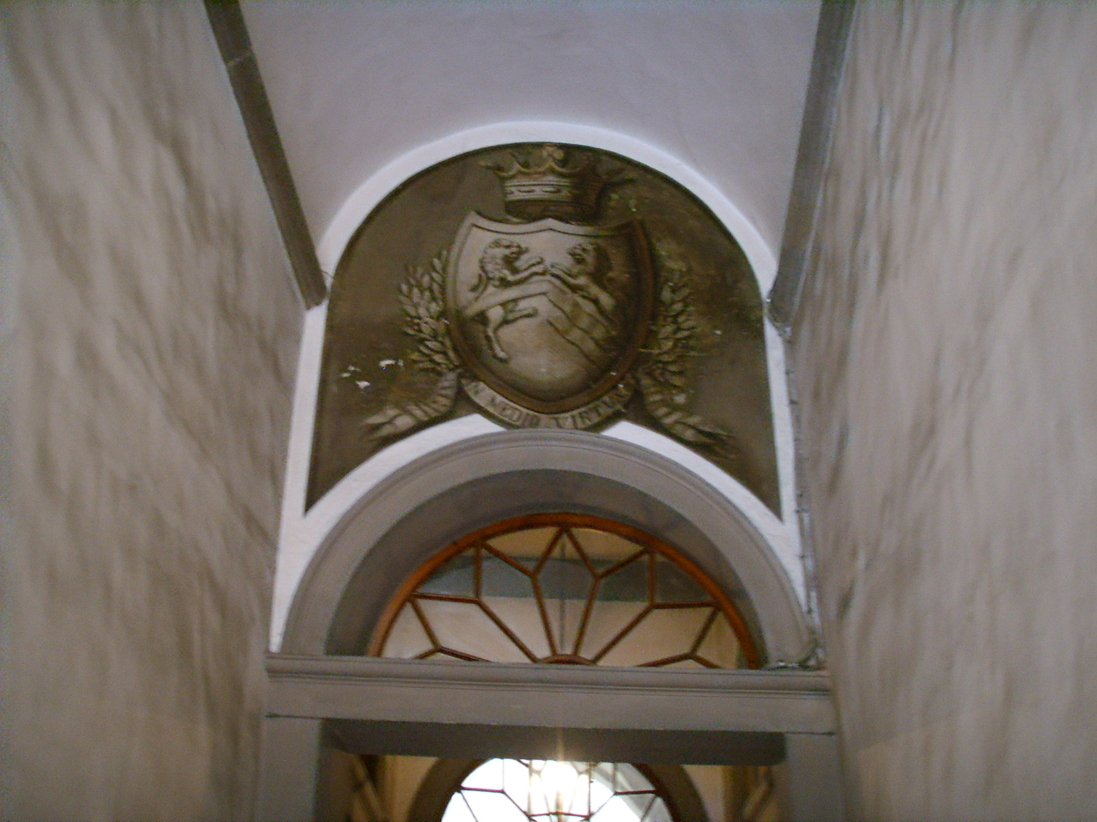 Palazzo martelini-rosselli del turco stemma Rosselli del Turco nell'atrio